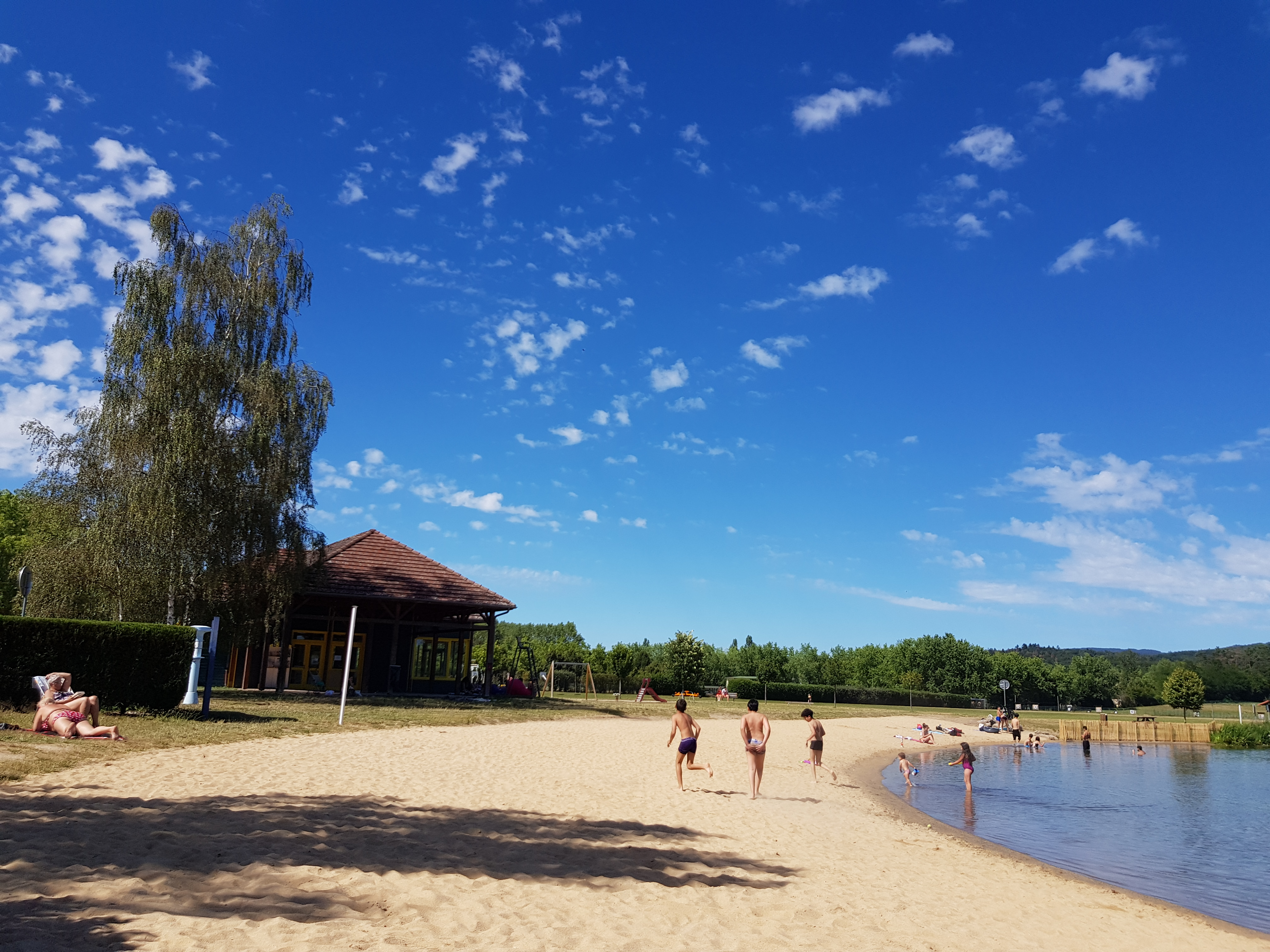 Plage d'ILOA à Thiers